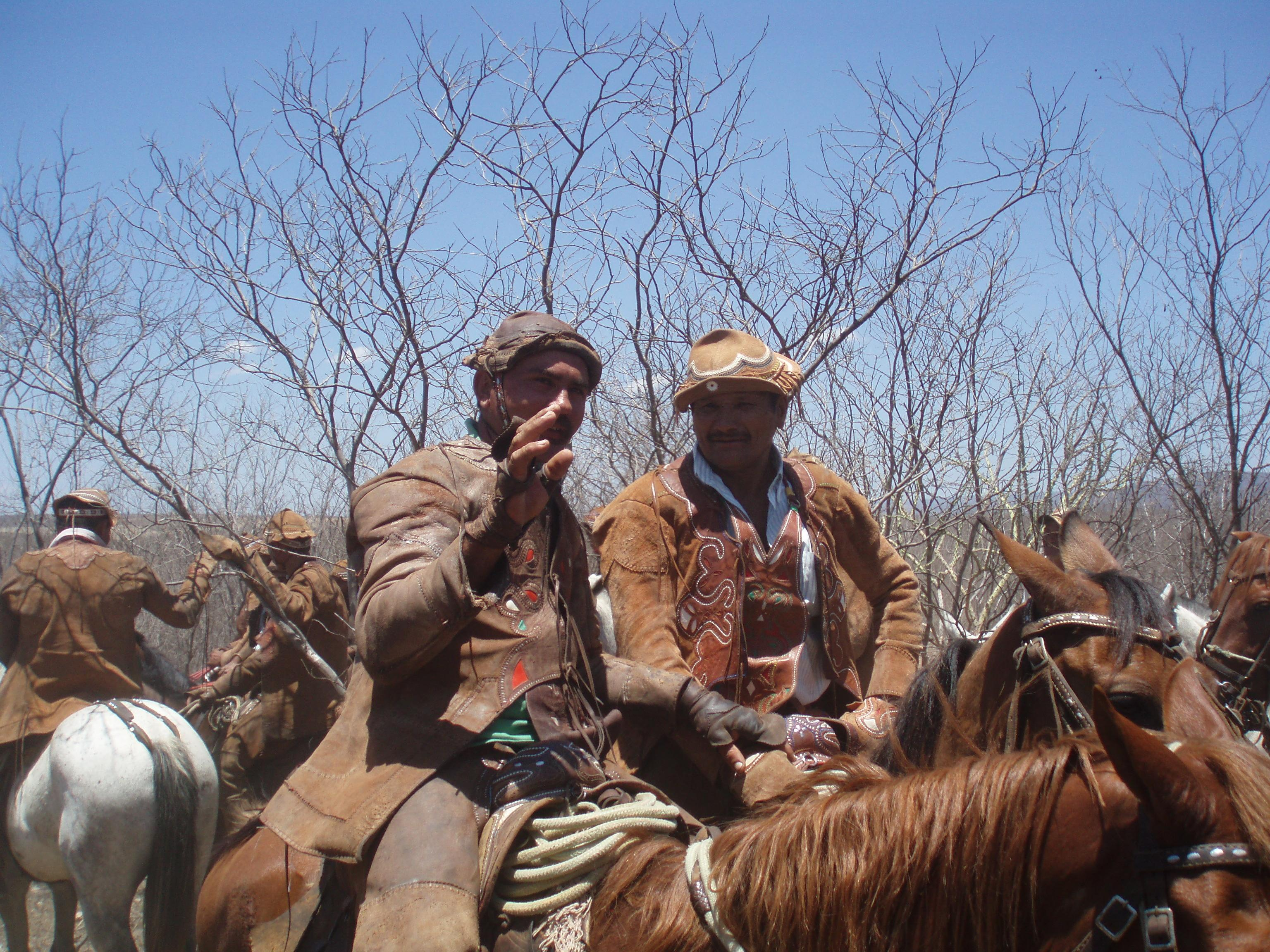 Vaqueiros em posição de guarda na Caatinga/Foto Joao Monteiro Neto